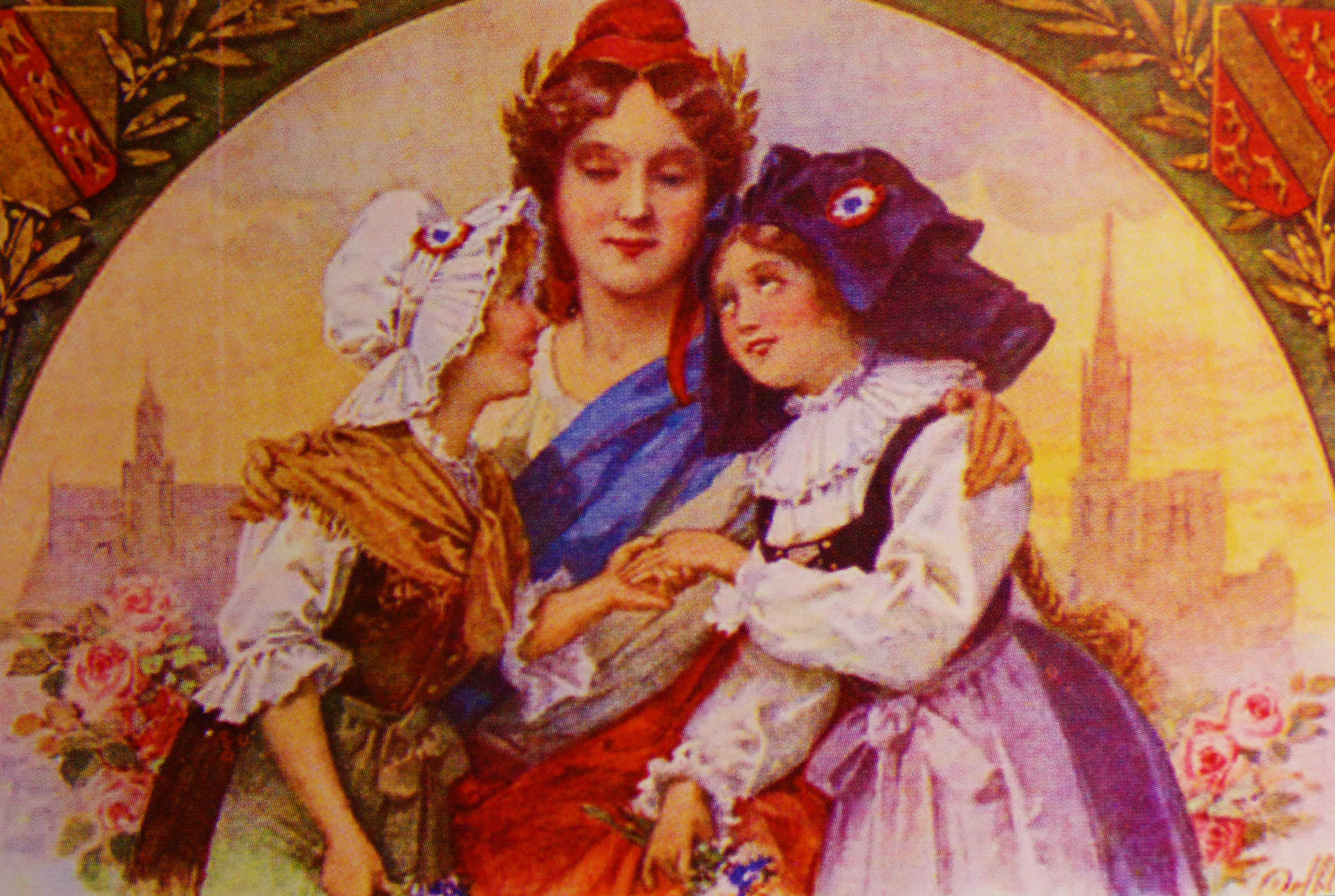 Trachtenallegorien Lothringens und des Elsass werden von der Personifikation der Französischen Republik umarmt, undatierte Postkarte, Archiv Association pour la Conservation de la Mémoire de la Moselle en 1939-45